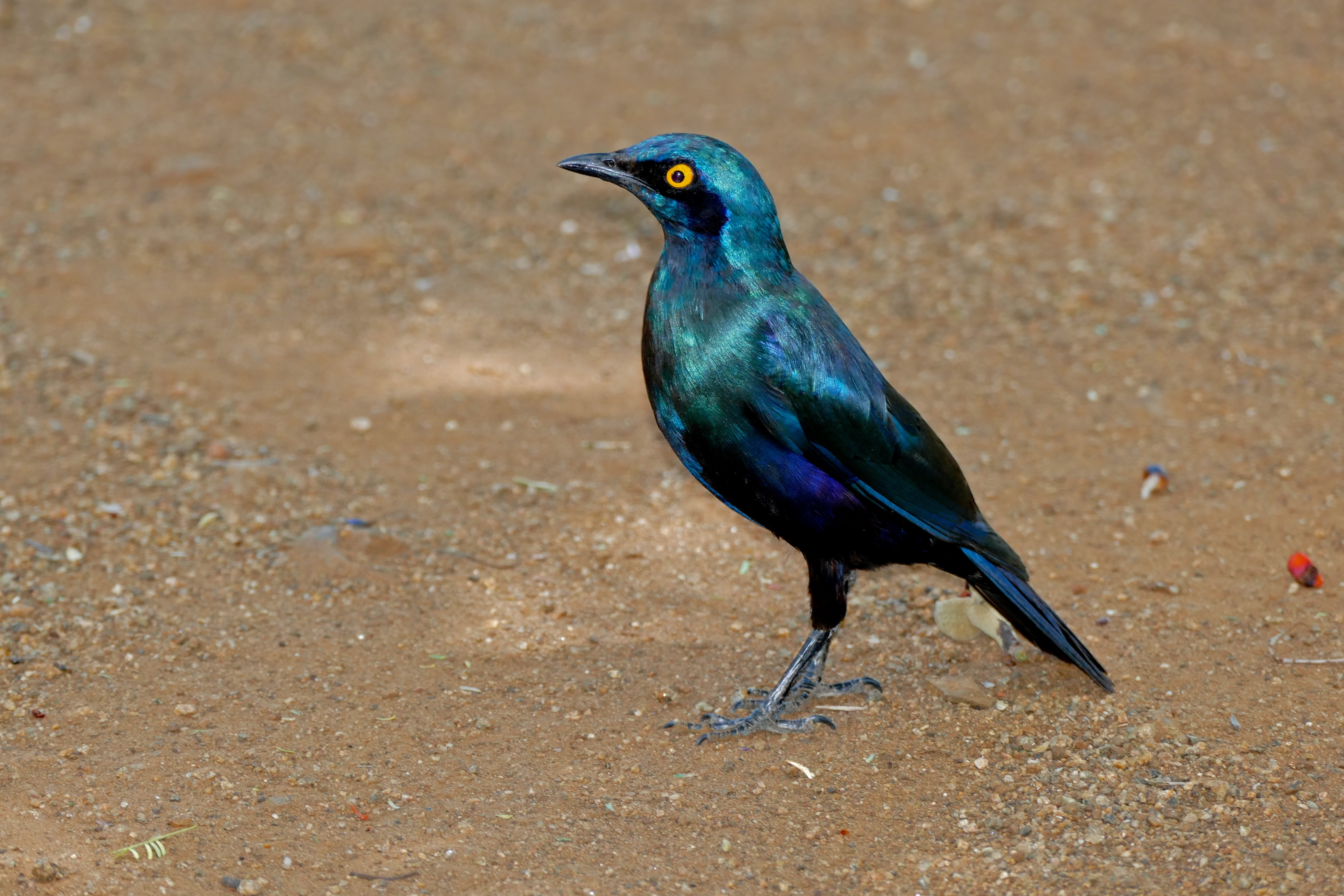 Tshokwane, Kruger NP, SOUTH AFRICA